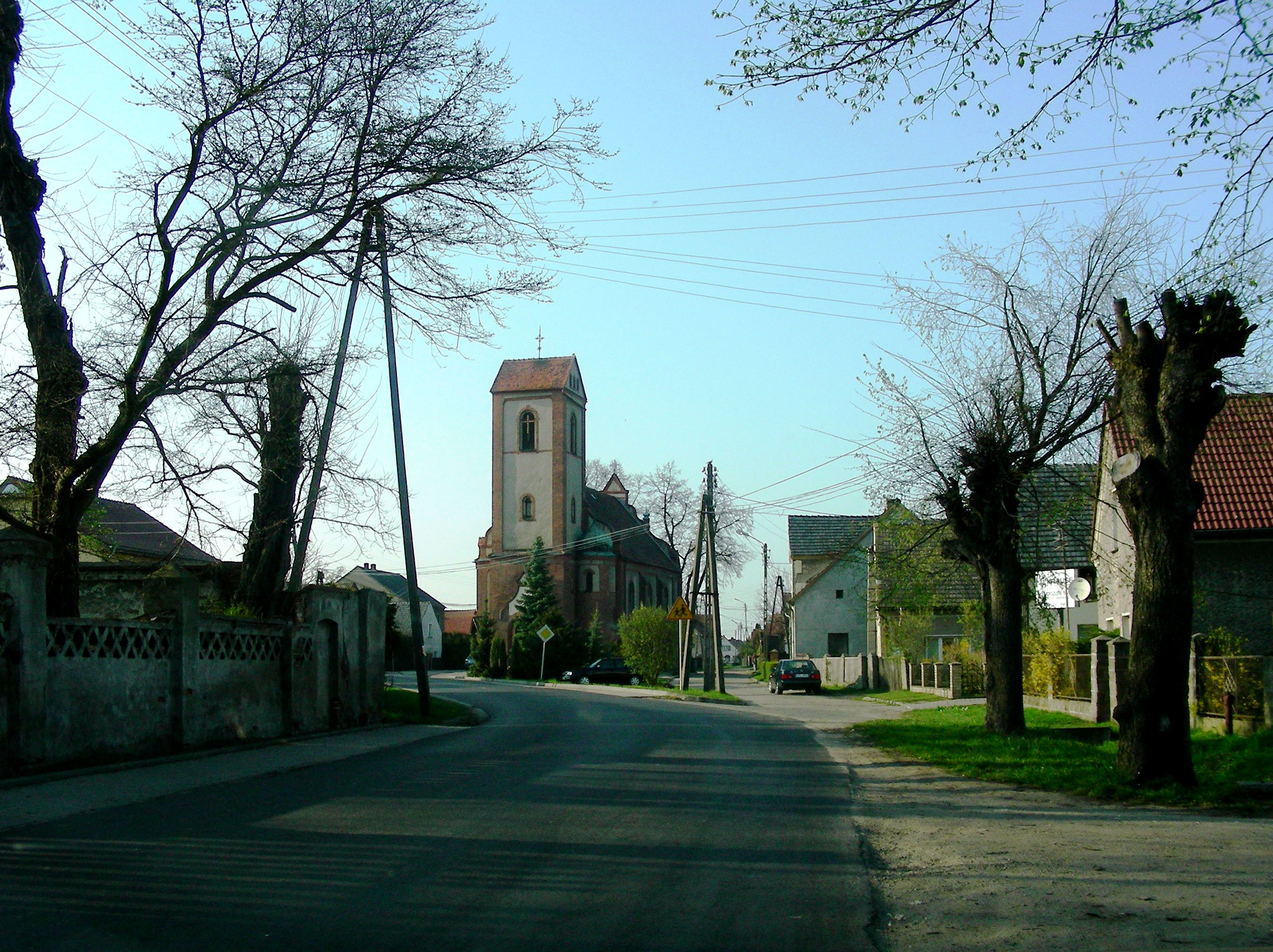 Kościół pod wezwaniem św. Floriana, Narok, gmina Dąbrowa, powiat opolski, województwo opolskie